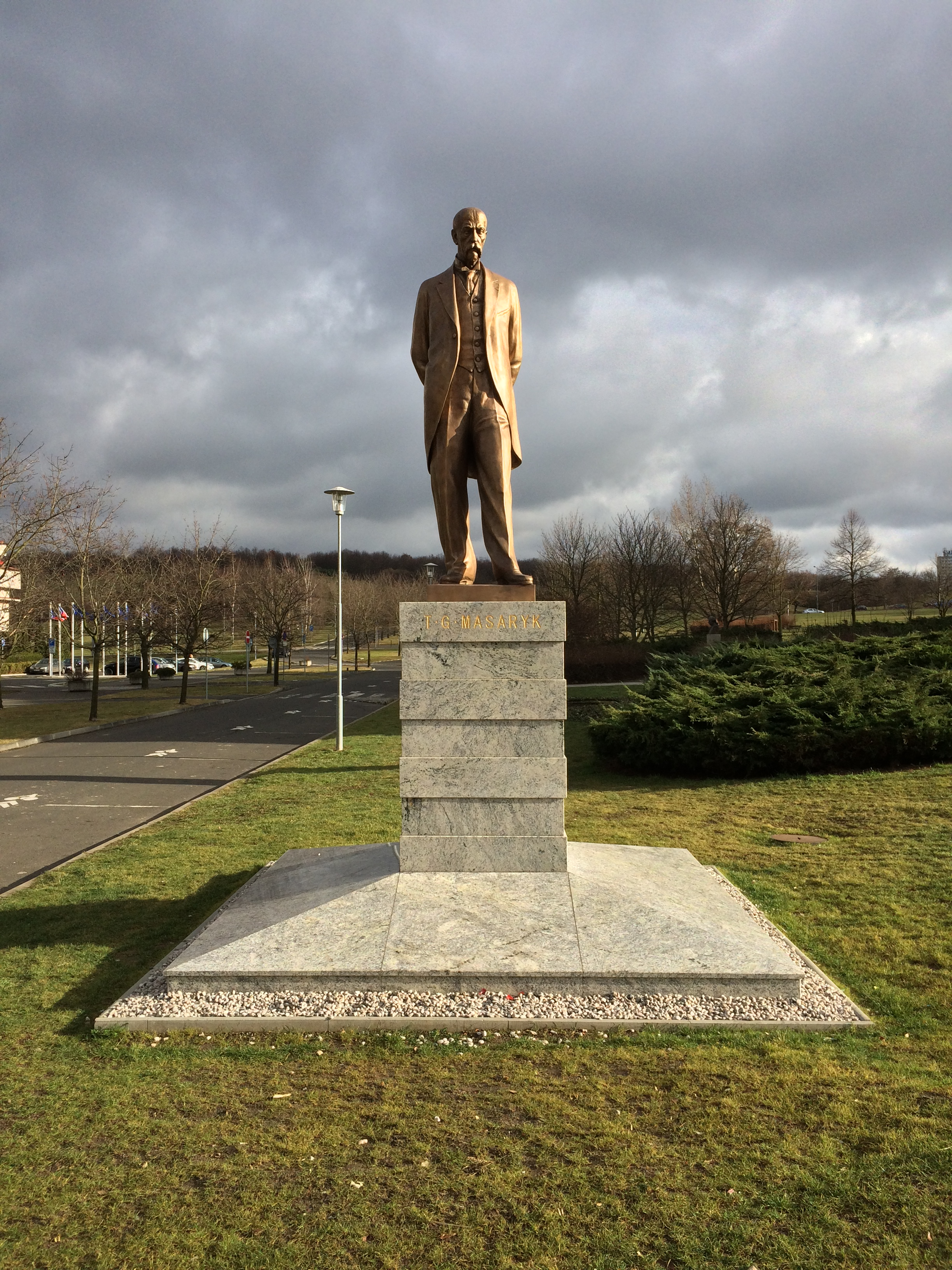 Pomník Tomáše Garrigue Masaryka se nachází poblíž magistrátu v Mostě, v těsném sousedství hotelu Cascade a městského divadla. Původní sochu T. G. Masaryka vytvořil sochař Josef Fojtík kolem roku 1935. V roce 1938 byla Němci odstraněna a počátkem roku 1940 roztavena. Socha byla znovuobnovena v roce 1946 ale opětovně byla odstraněna v roce 1955. V roce 1978 byla socha rozřezána na malé kousky a z této podoby byla znovuzrestaurována až v letech 2012 až 2014 bratranci Mgr. Jaroslavem Šindelářem mladším a Ondřejem Šindelářem. Slavnostně potřetí odhalena dne 23. září 2014.